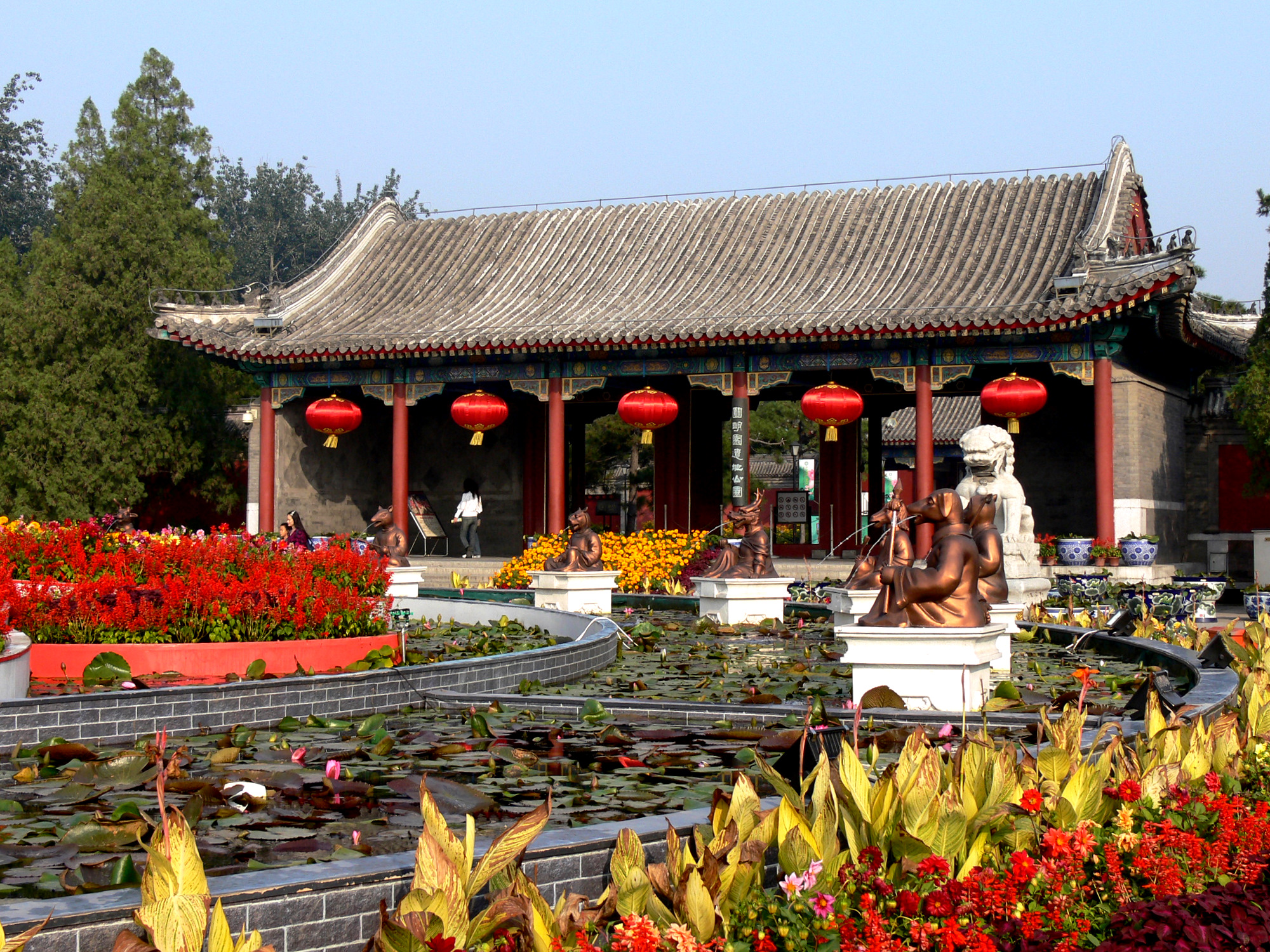 中文（中国大陆）: 圆明园遗址公园绮春园宫门。1987年在原址修复内、外两道宫门及宫墙、角门，作为圆明园遗址公园大门。门前曾摆放的仿制喷水十二生肖兽首铜像。